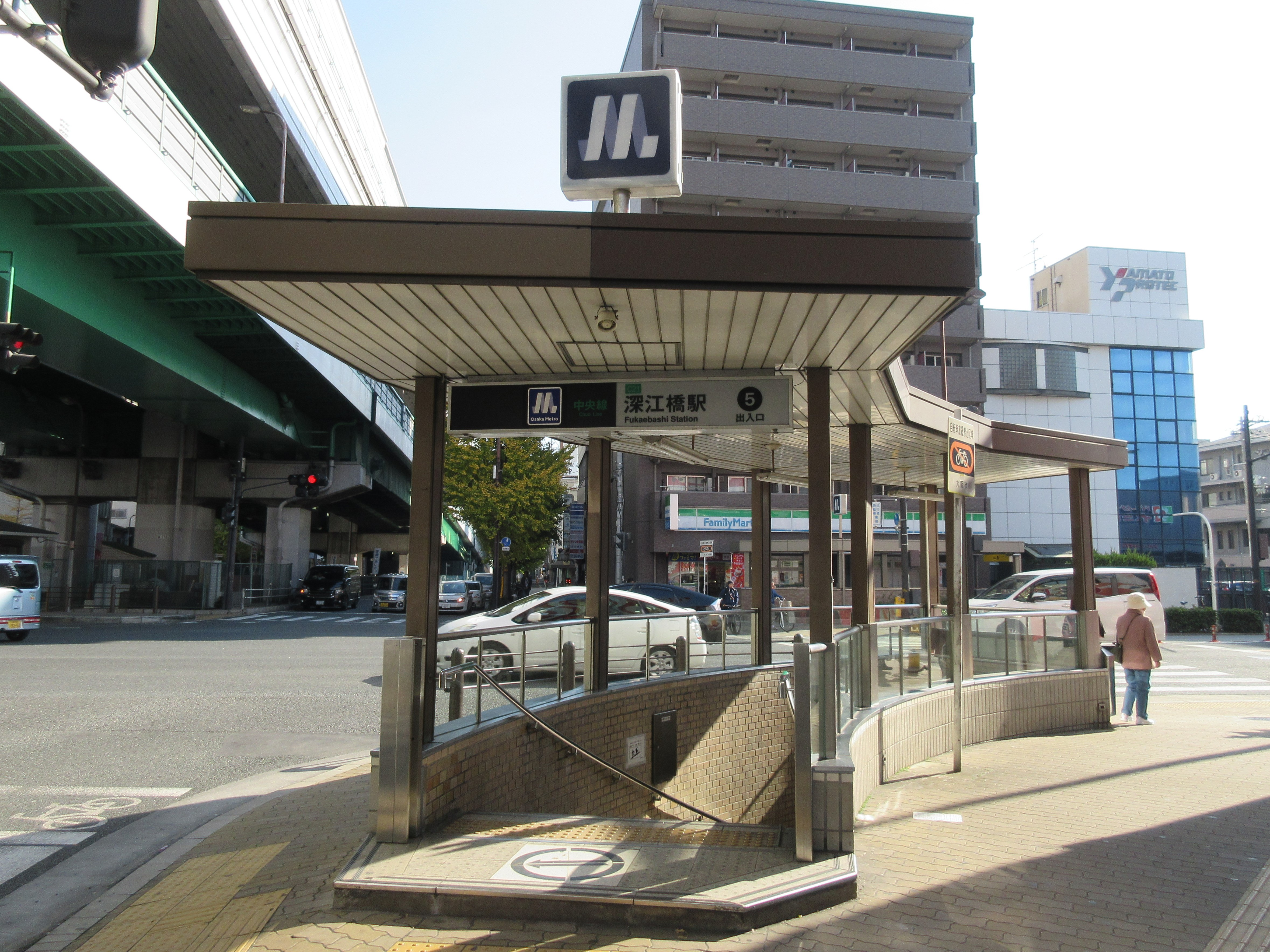 大阪市高速電気軌道（Osaka Metro）深江橋駅